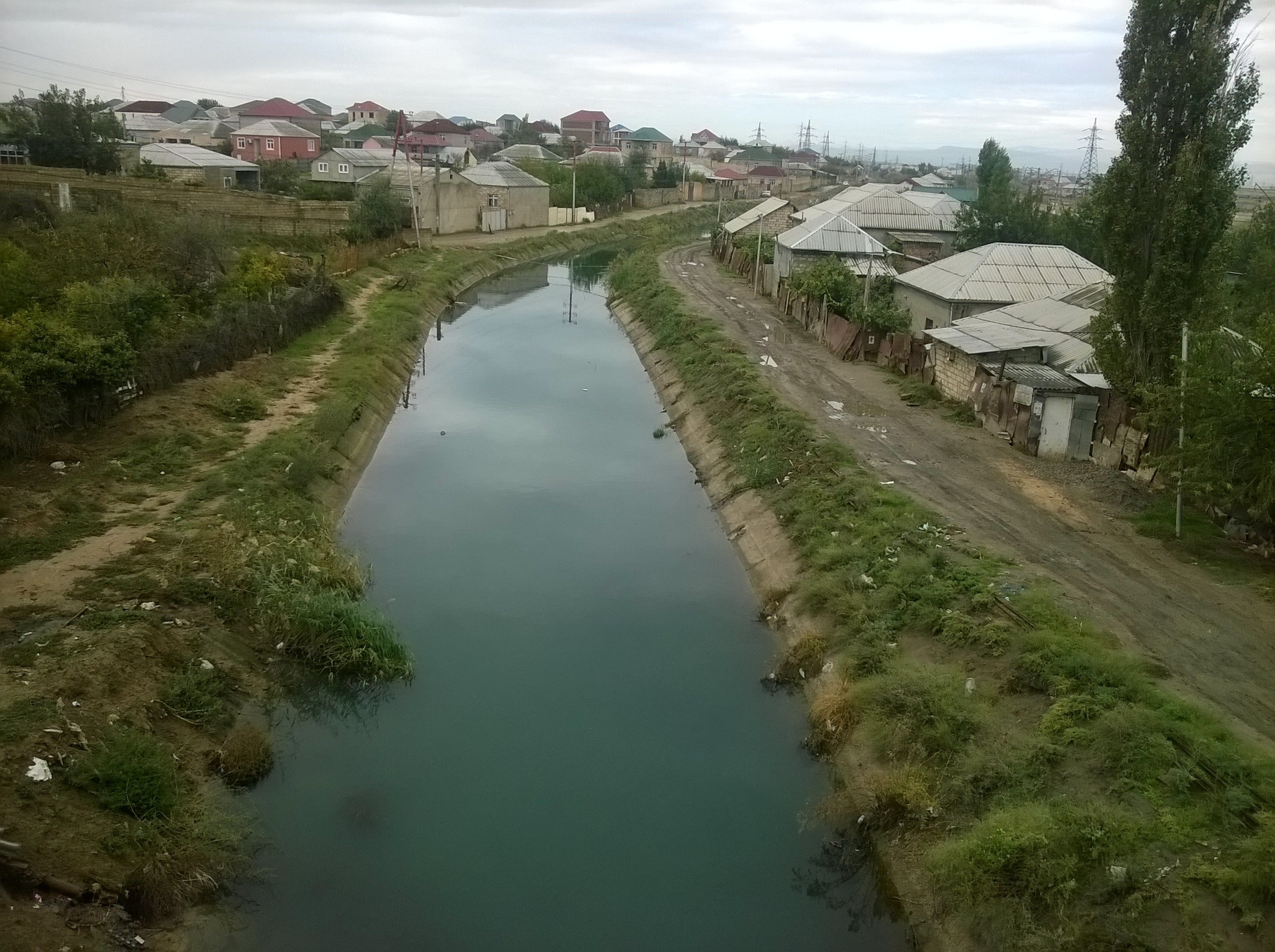 Abşeron kanalı